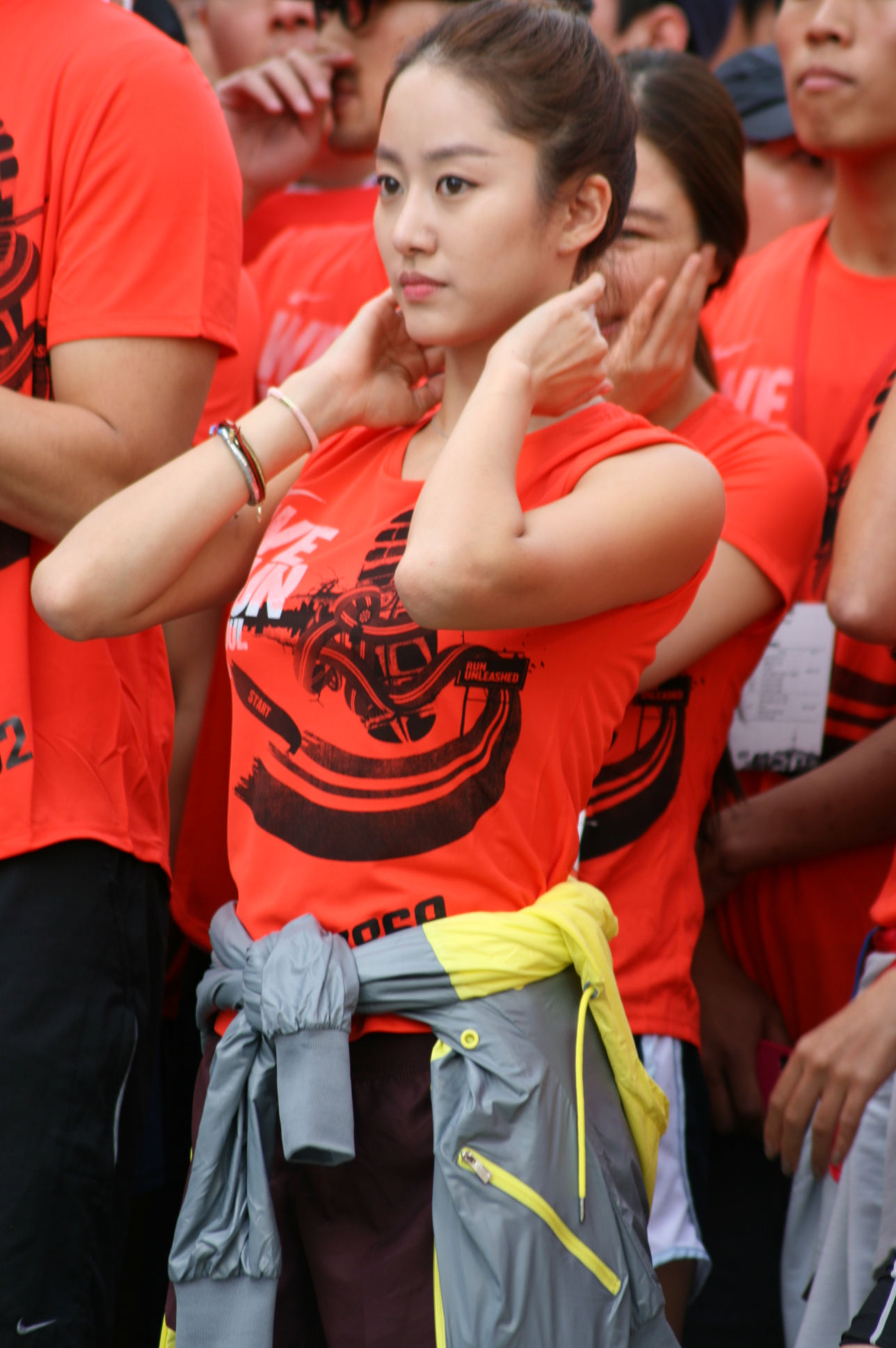 나이키위런서울텐케이 415